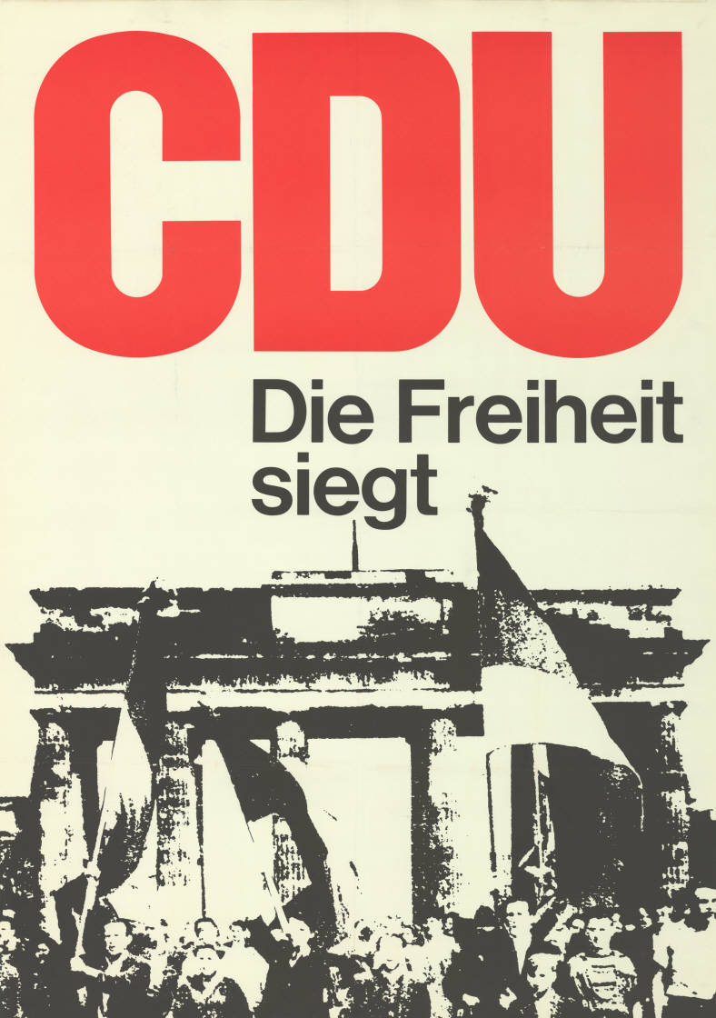 CDU Die Freiheit siegt Abbildung: Demonstranten am Brandenburger Tor (Fotomontage/Grafik) Kommentar: Bereits 1966 erschienen. Plakatart: Motiv-/Textplakat Objekt-Signatur: 10-004 : 305 Bestand: Plakate zu Abgeordnetenhauswahlen Berlin (10-004) GliederungBestand10-18: Plakate zu Abgeordnetenhauswahlen Berlin (10-004) » CDU Lizenz: KAS/ACDP 10-004 : 305 CC-BY-SA 3.0 DE